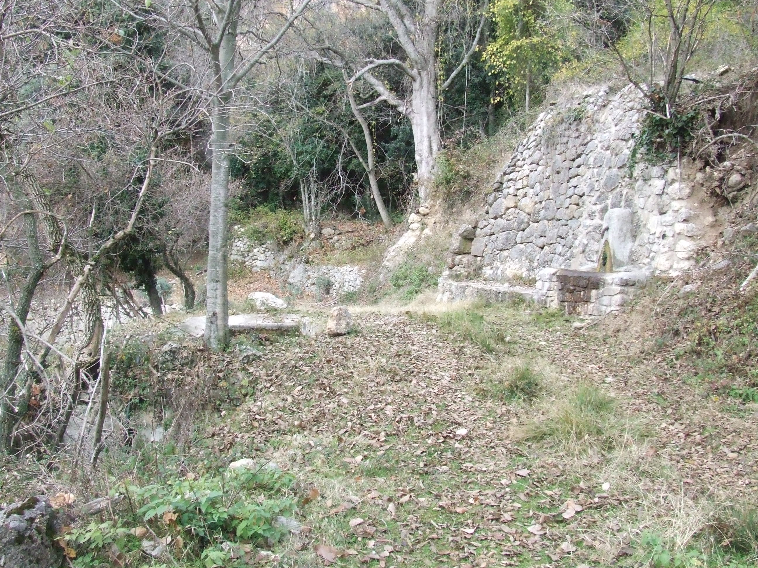 La Font del Toll (Herba-savina, Hortoneda de la Conca, Conca de Dalt, Pallars Jussà)